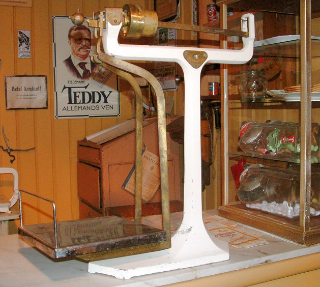 Alte Dezimalwaage